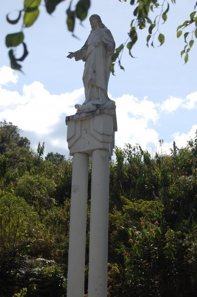 Nuestra Señora de las Misericordias. Santa Rosa de Osos, Antioquia. Colombia.